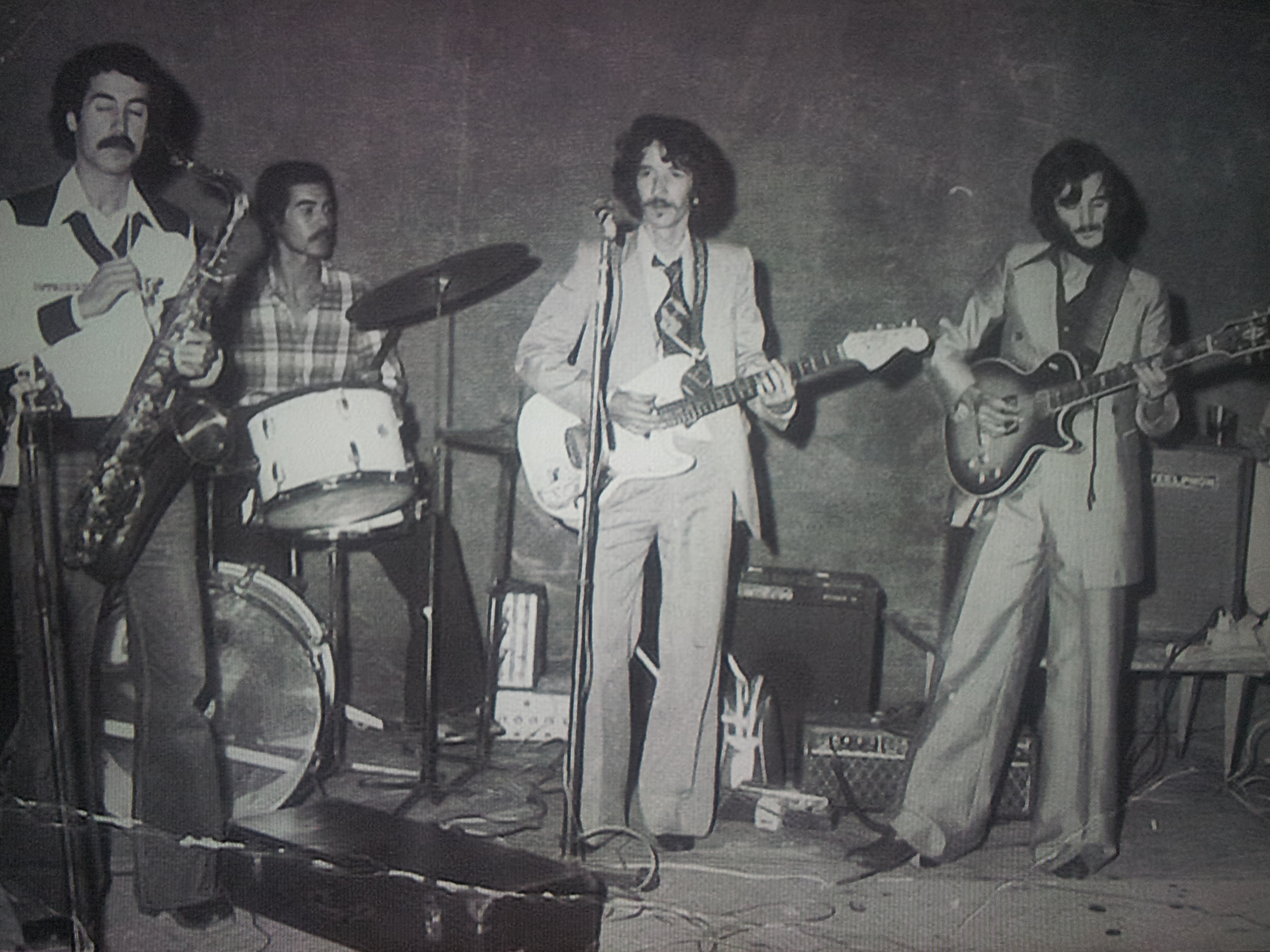 Groupe Les Aigles noirs (1972 - 1980), groupe musical algérien, l'ancêtre de Raïna Raï.